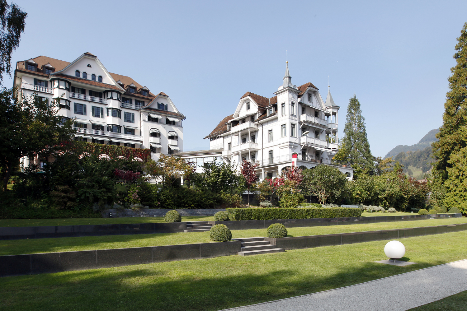 Das Hotel Park Weggis heute.